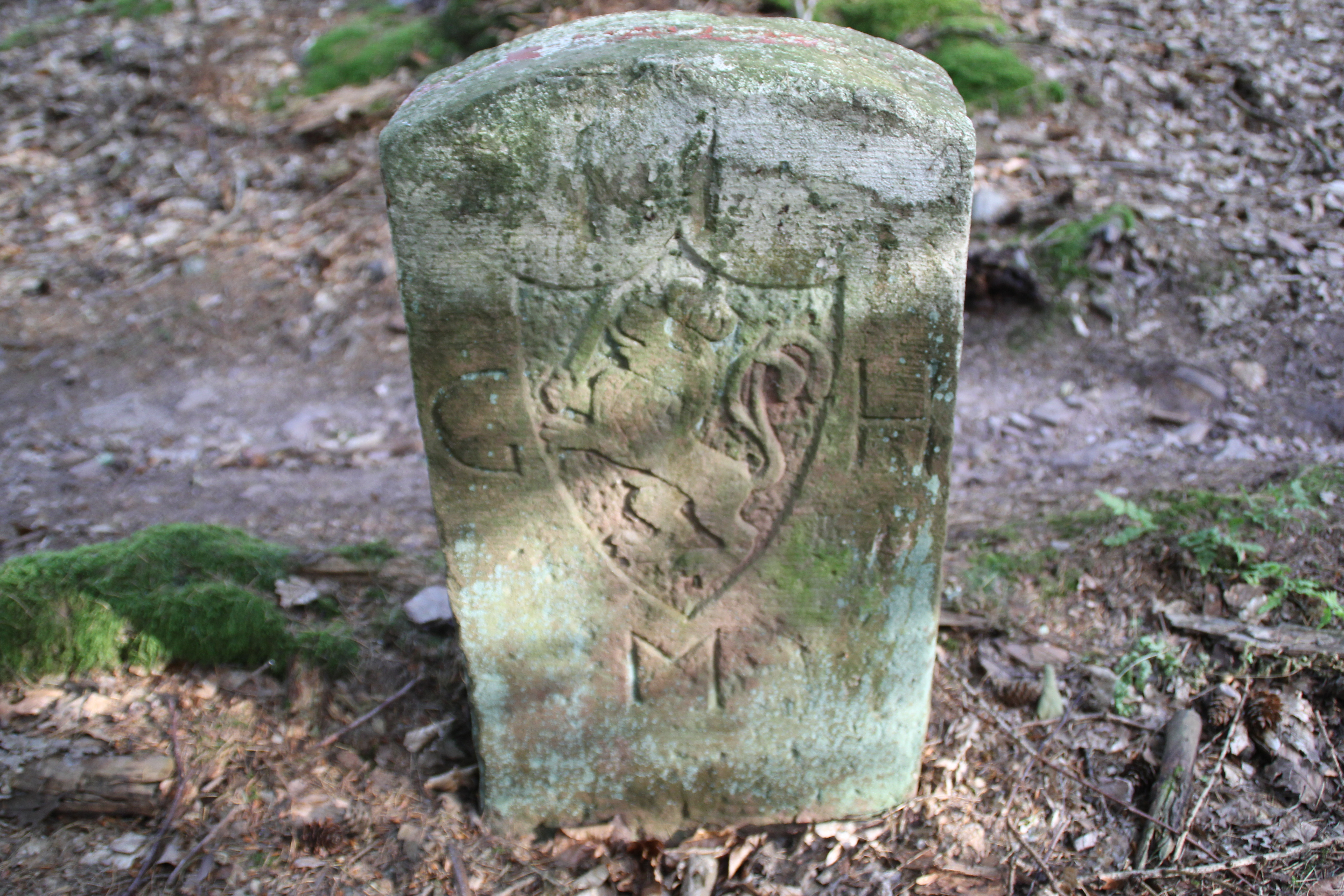 Grenzstein 234 auf der Hohen Mark zwischen Alzenau und Mömbris